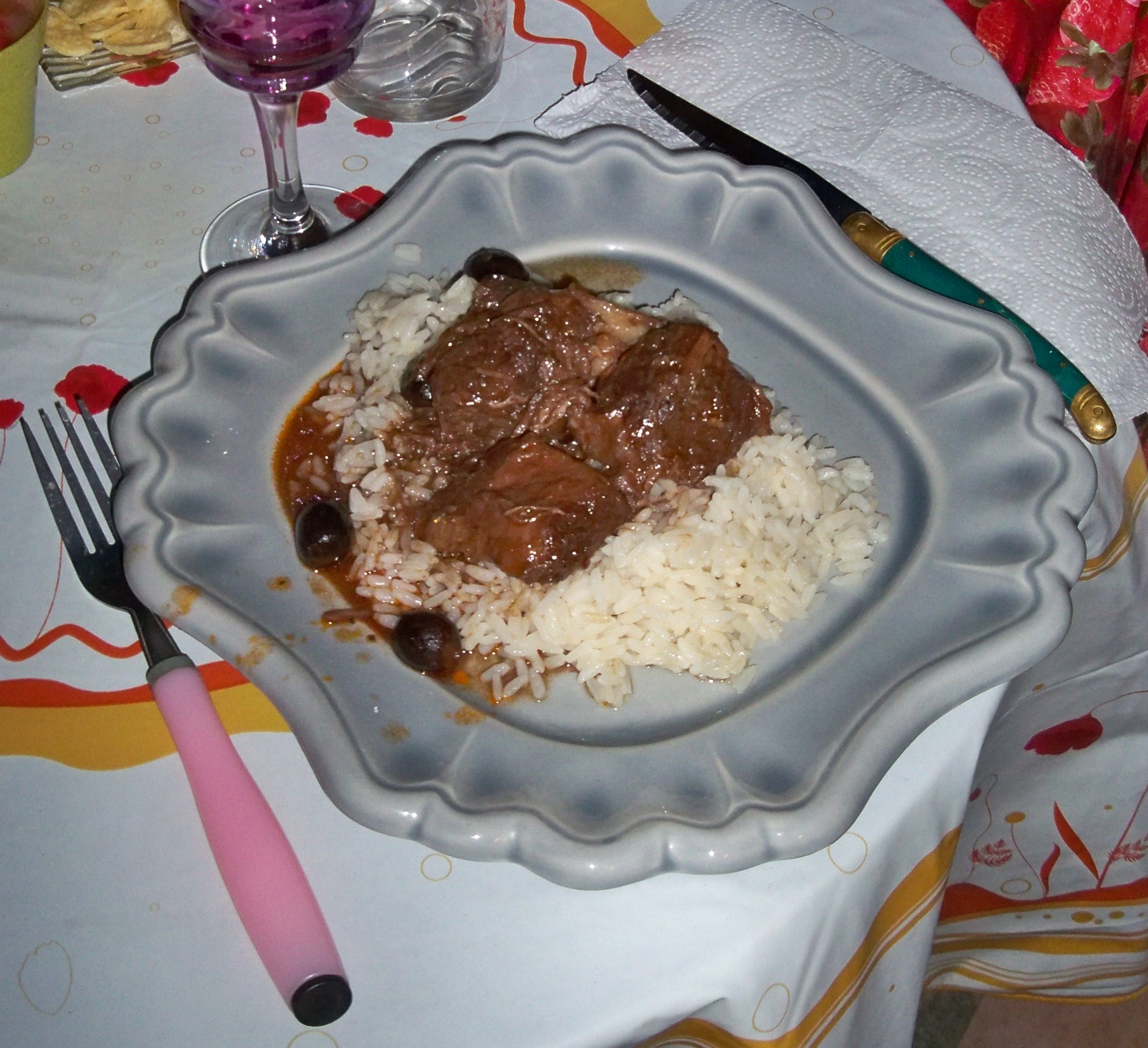 Gardiane de Taureau, plat camarguais